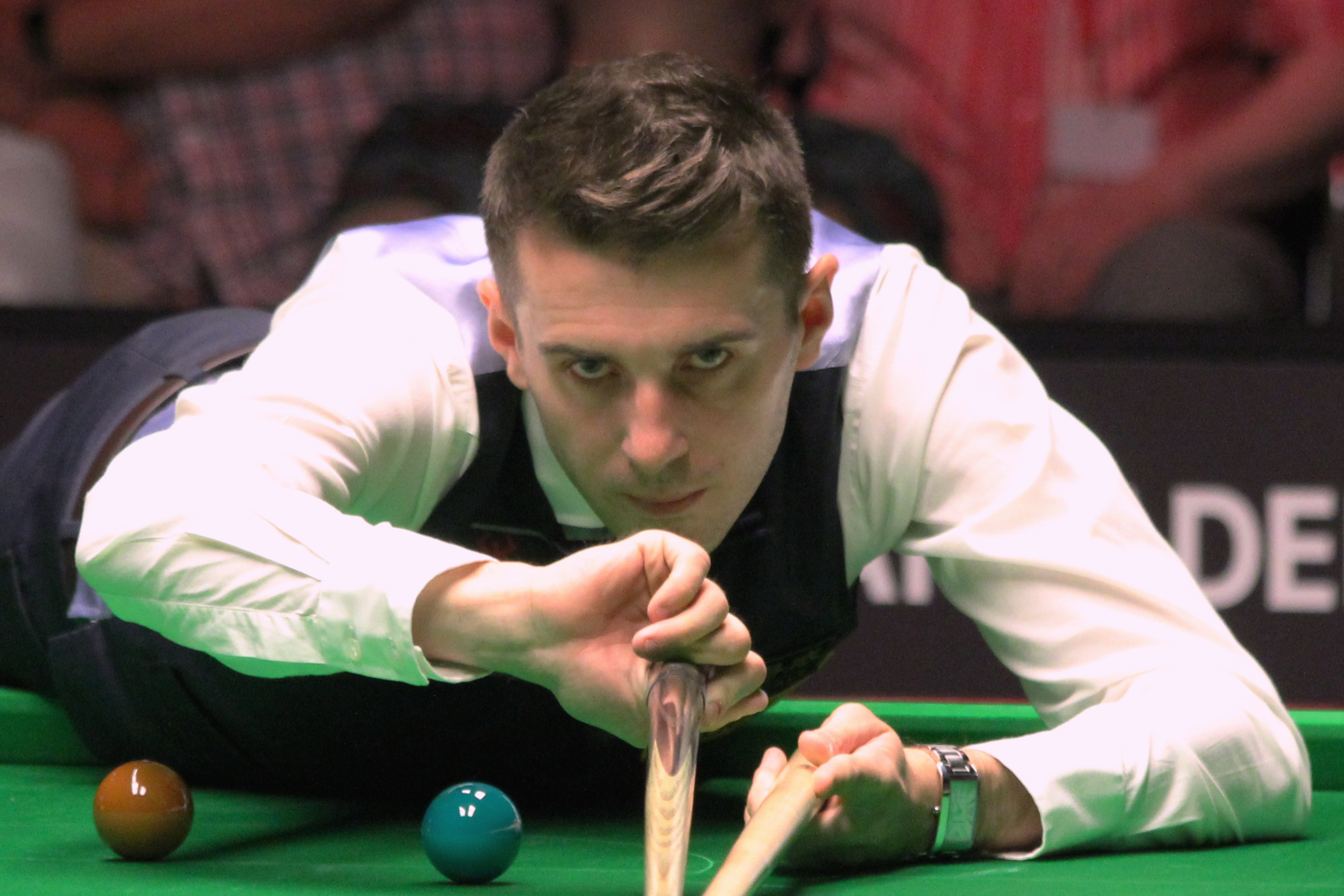 Mark Selby beim Paul Hunter Classic 2012